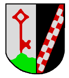 Das Wappen der Teilgemeinde Gutenzell in Gutenzell-Hürbel, Germany, Baden-Württemberg